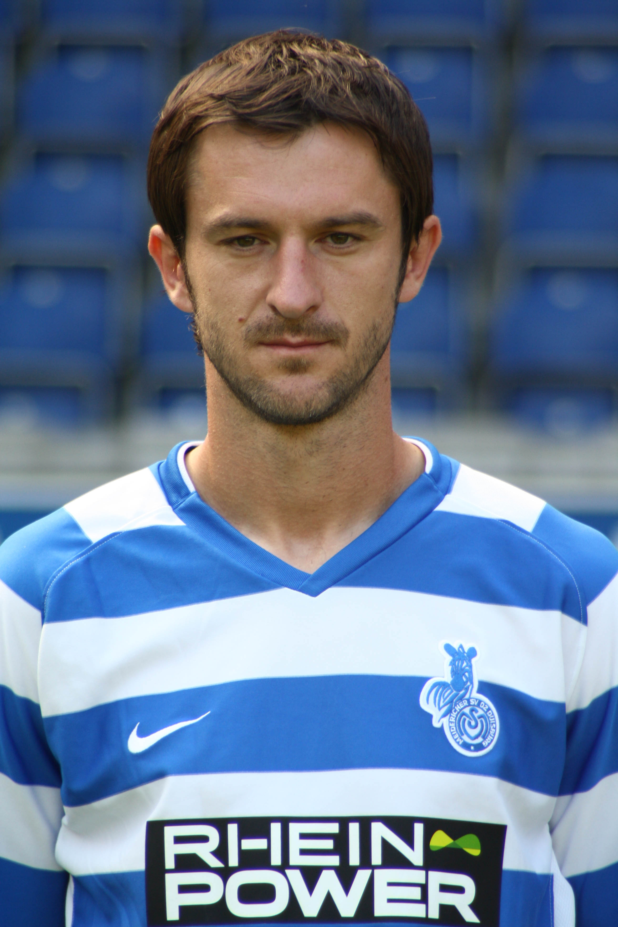 Branimir Bajic, MSV Duisburg